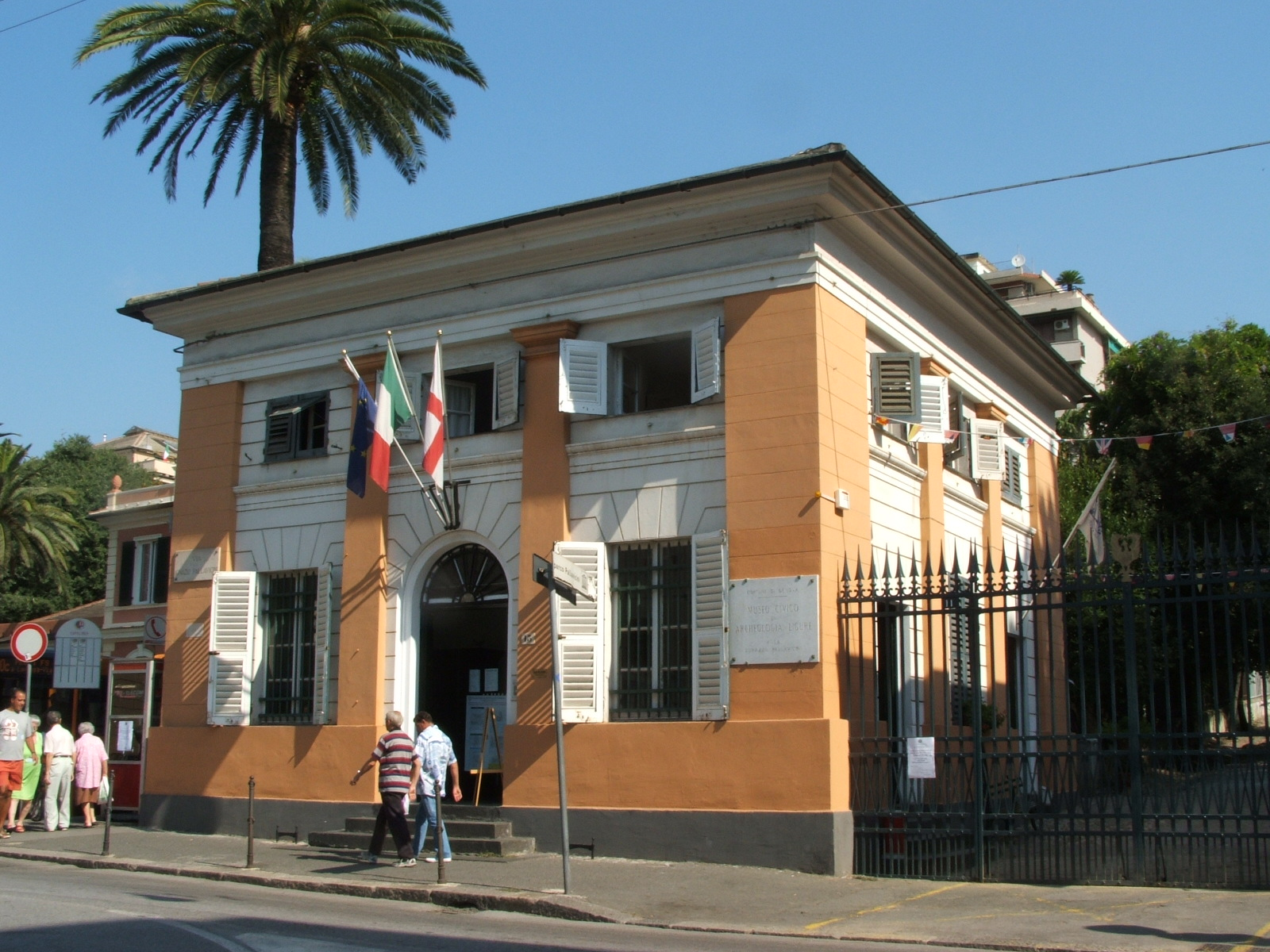 Immagine dal Genova-Pegli, Italia: ingresso al Museo Archeologico Ligure.